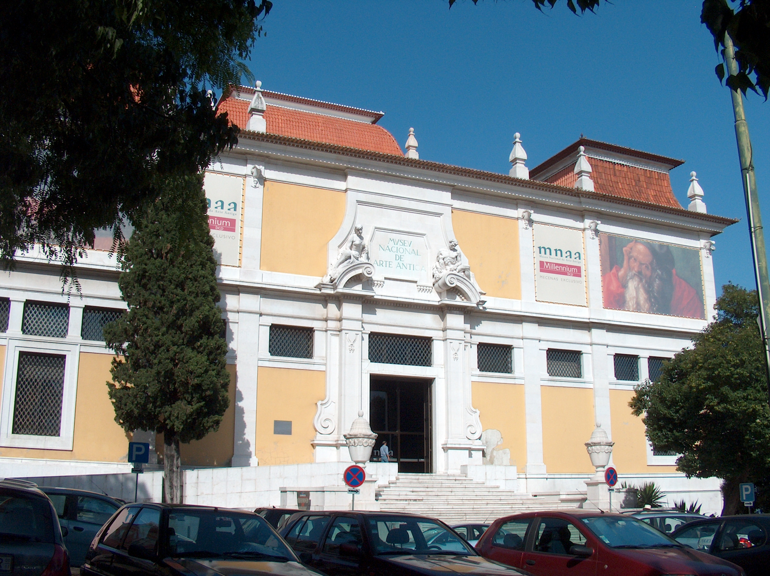 Museu Nacional de Arte Antiga, Museu das Janelas Verdes ou Palácio Alvor This file was uploaded for Wiki Loves Monuments in Portugal with the unique identifier 73649.